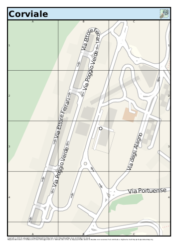 Plan du quartier du Corviale, à Rome